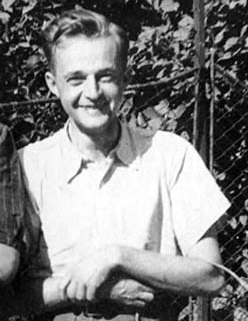 Civilní fotografie Jana Buly v pracovním. K faře v Rokytnici patřil záhumenek o rozloze jednoho hektaru, který farář obhospodařoval. • Toto je výřez z výchozího dokumentu: •